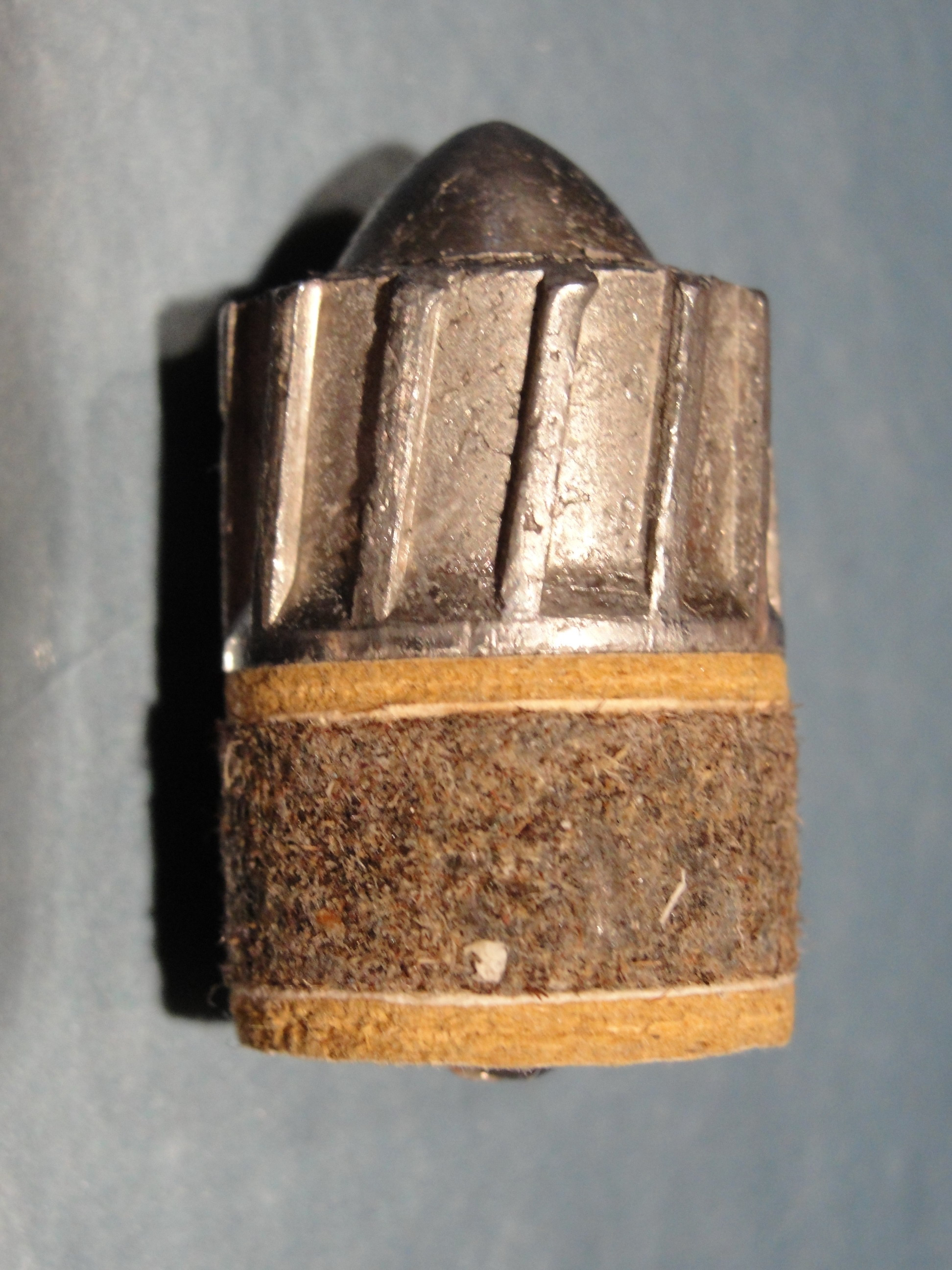 Brenneke Slug, 12th Bore